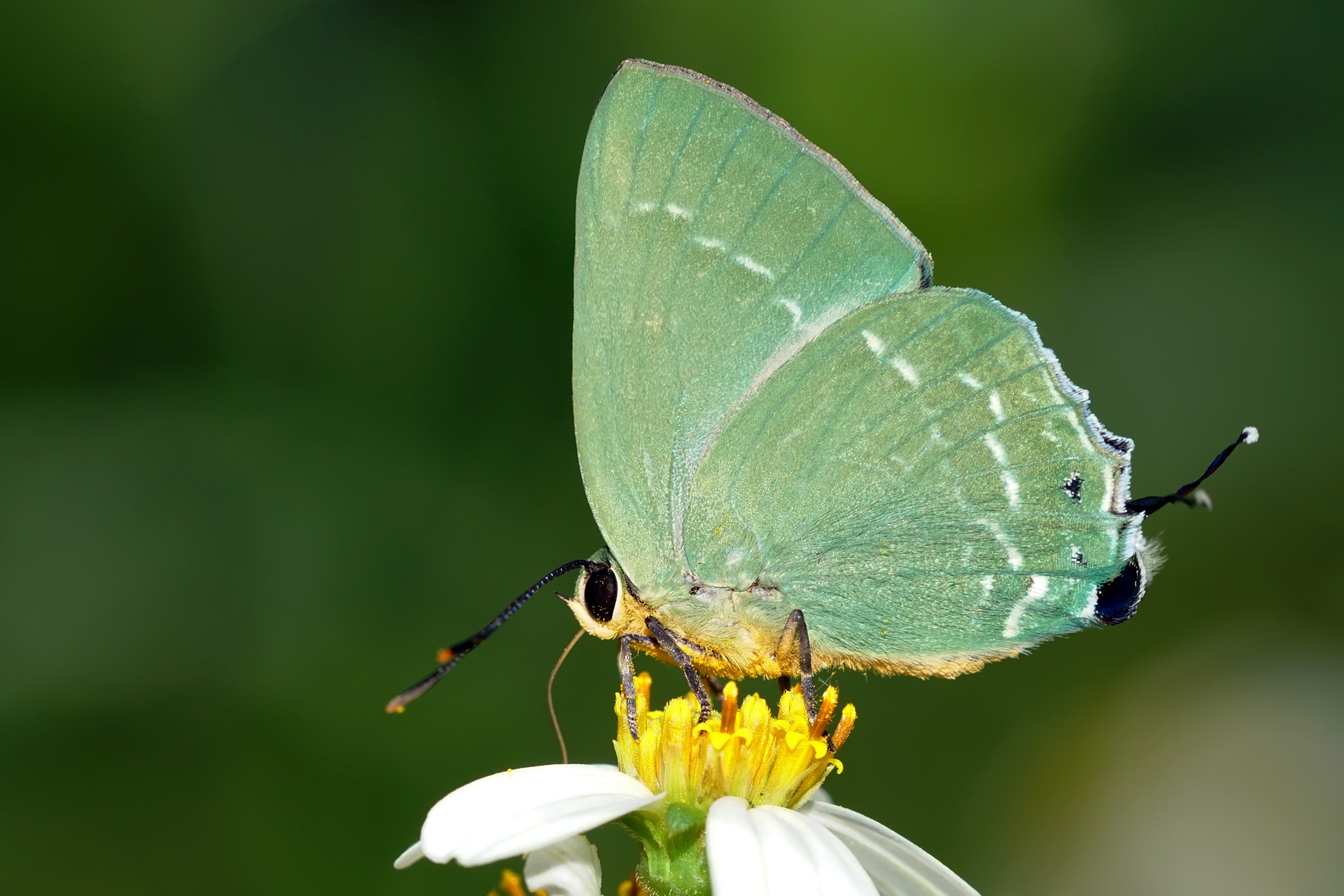 中文（台灣）: 綠灰蝶 Artipe eryx horiella